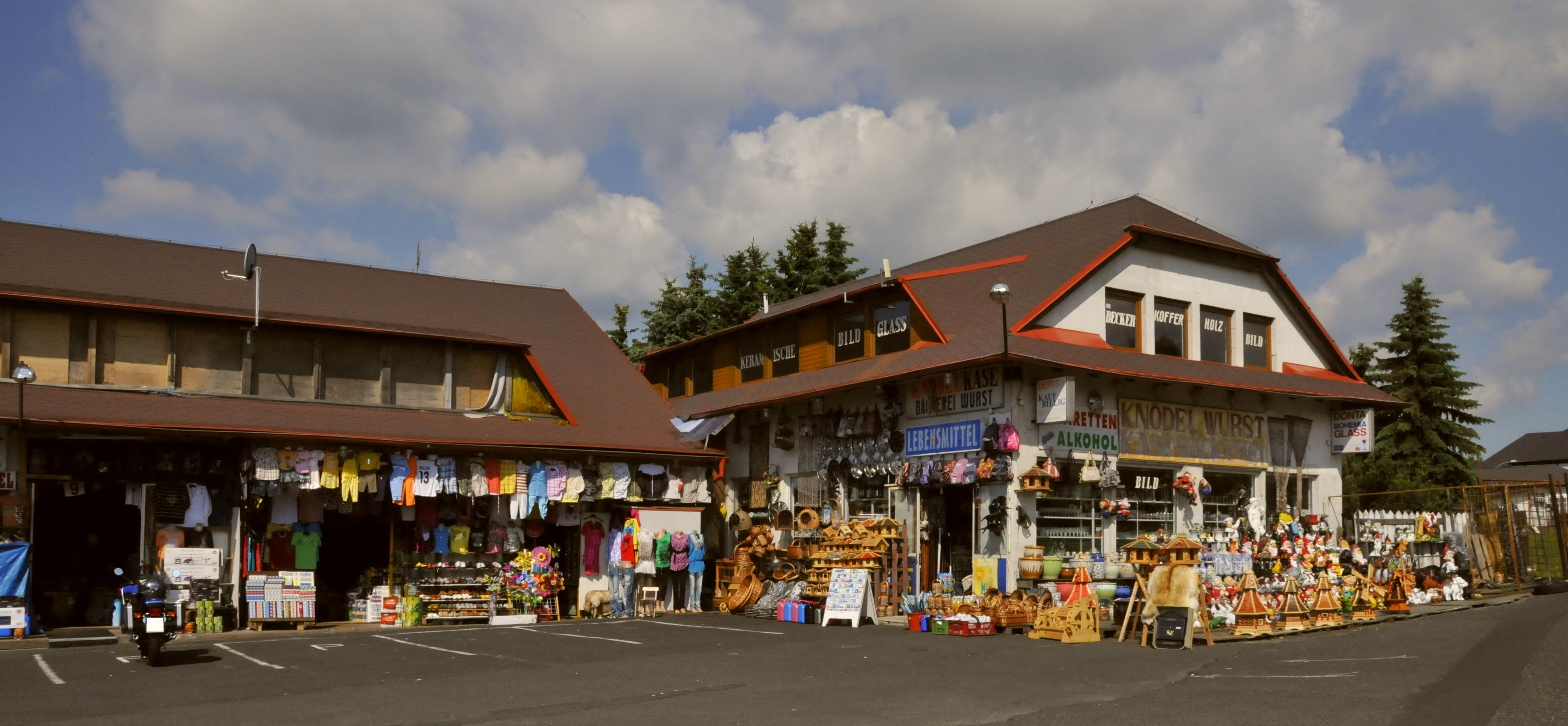 Hora Svatého Šebestiána, Andenkengeschäfte in Grenznähe